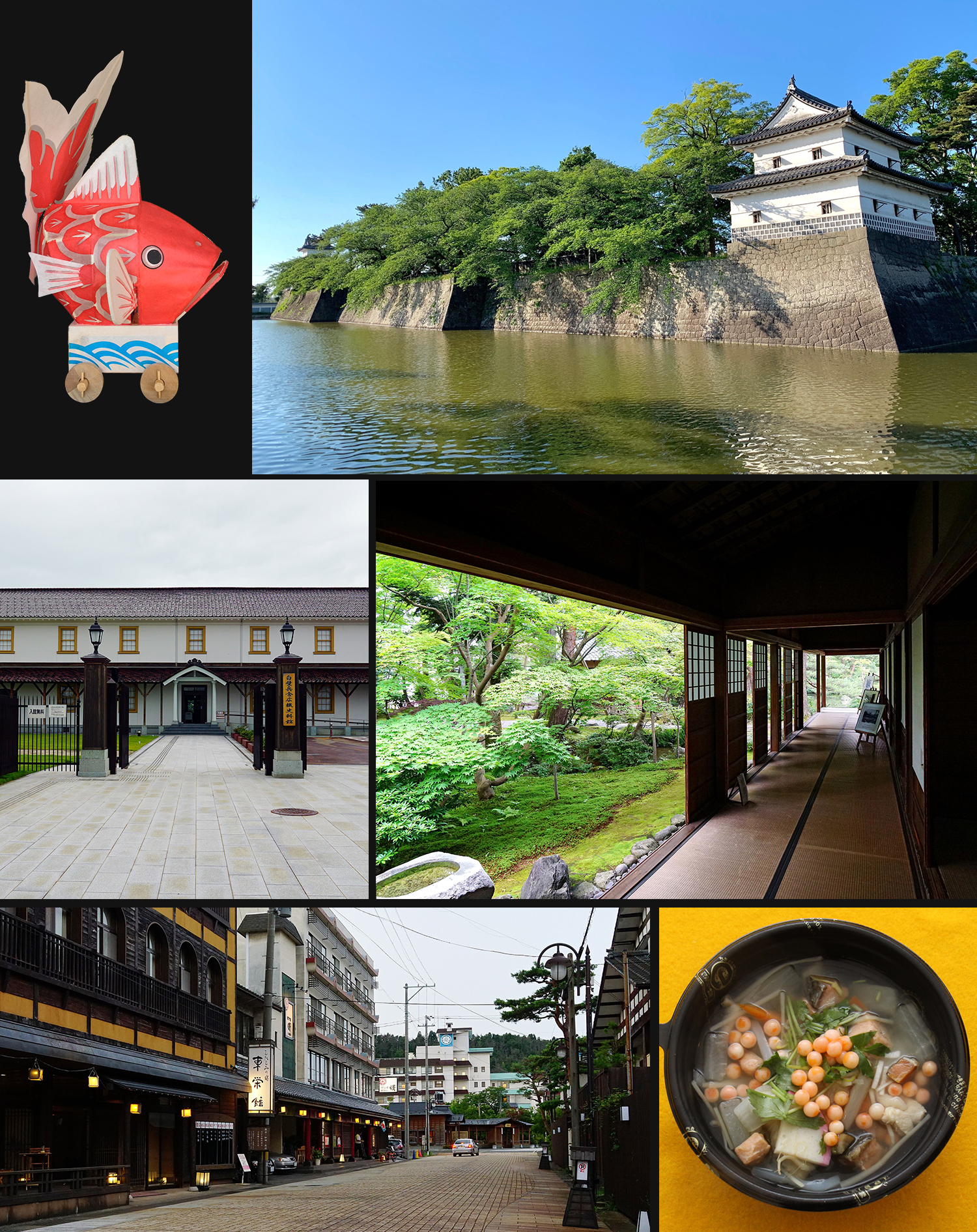 新潟県新発田市のモンタージュ。